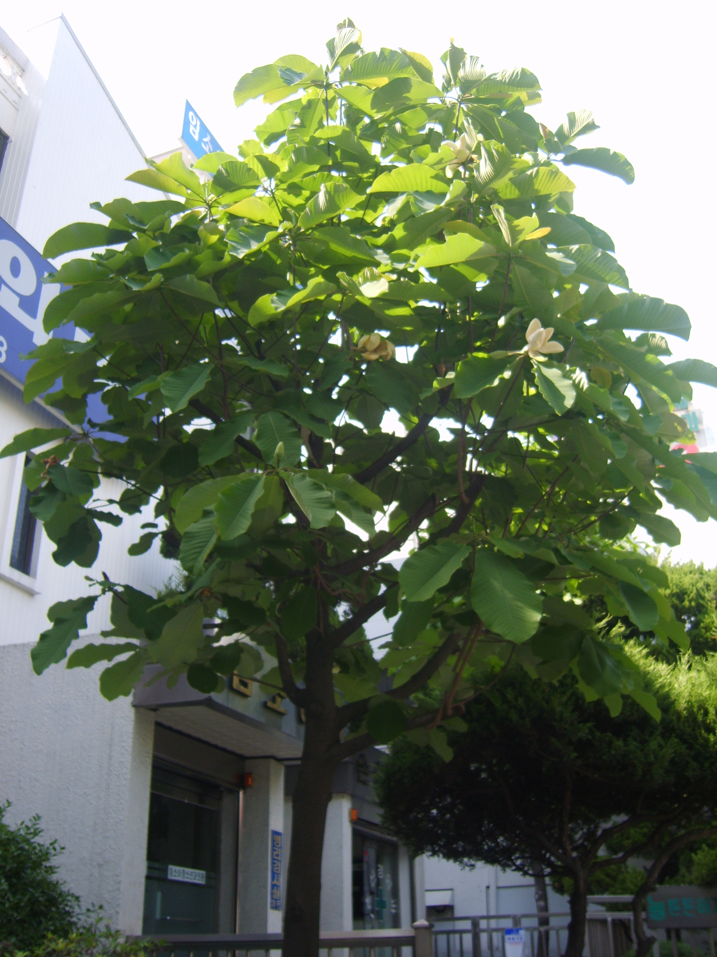 Magnolia obovata in Incheon Korea. 인천 부평, 임소아과 뜰에 사는 일본목련